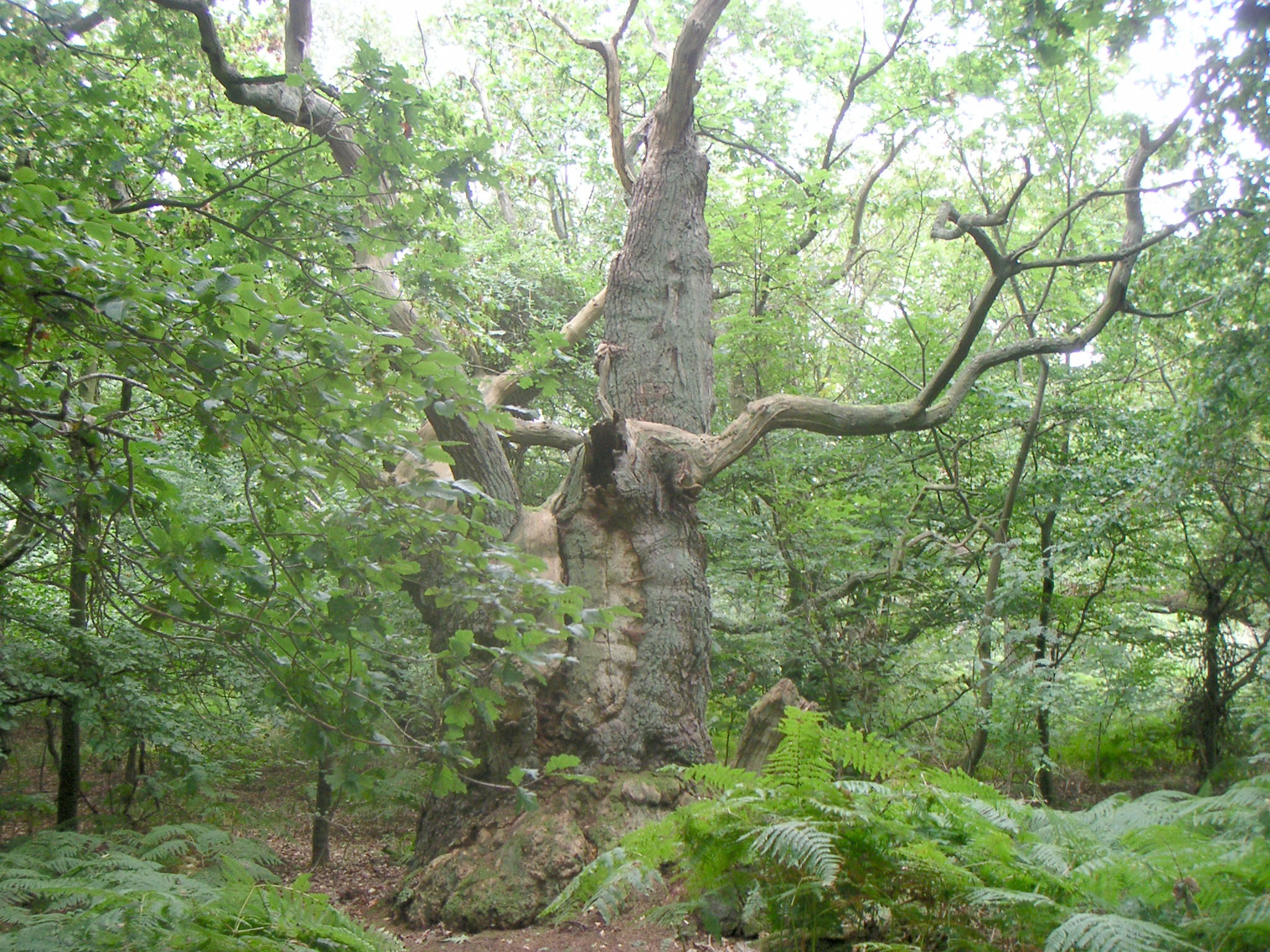 Hudeeiche on Vilm